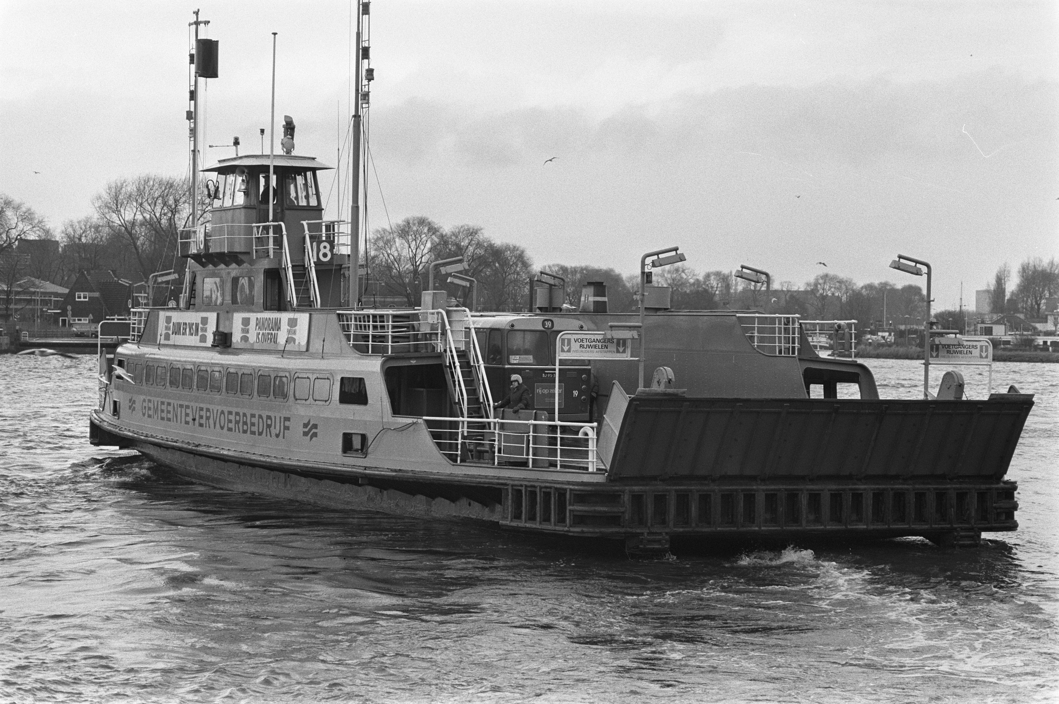 Collectie / Archief : Fotocollectie Anefo Reportage / Serie : Pont over het IJ in Amsterdam Beschrijving : Pont tijdens overtocht Datum : 25 november 1981 Locatie : Amsterdam, Noord-Holland Trefwoorden : IJ, ponten Fotograaf : Antonisse, Marcel / Anefo Auteursrechthebbende : Nationaal Archief Materiaalsoort : Negatief (zwart/wit) Nummer archiefinventaris : bekijk toegang 2.24.01.05 Bestanddeelnummer : 931-8266 Reacties Geplaatst door Pieter Klein op 26 februari 2012 - 20:01. De veerdienst staat bekend als het Buiksloterwegveer of de Tolhuispont. Bij deze dienst bevond er zich een bushalte op de pont. Het vaartuig is het Gemeente veer 18 later IJveer 18.